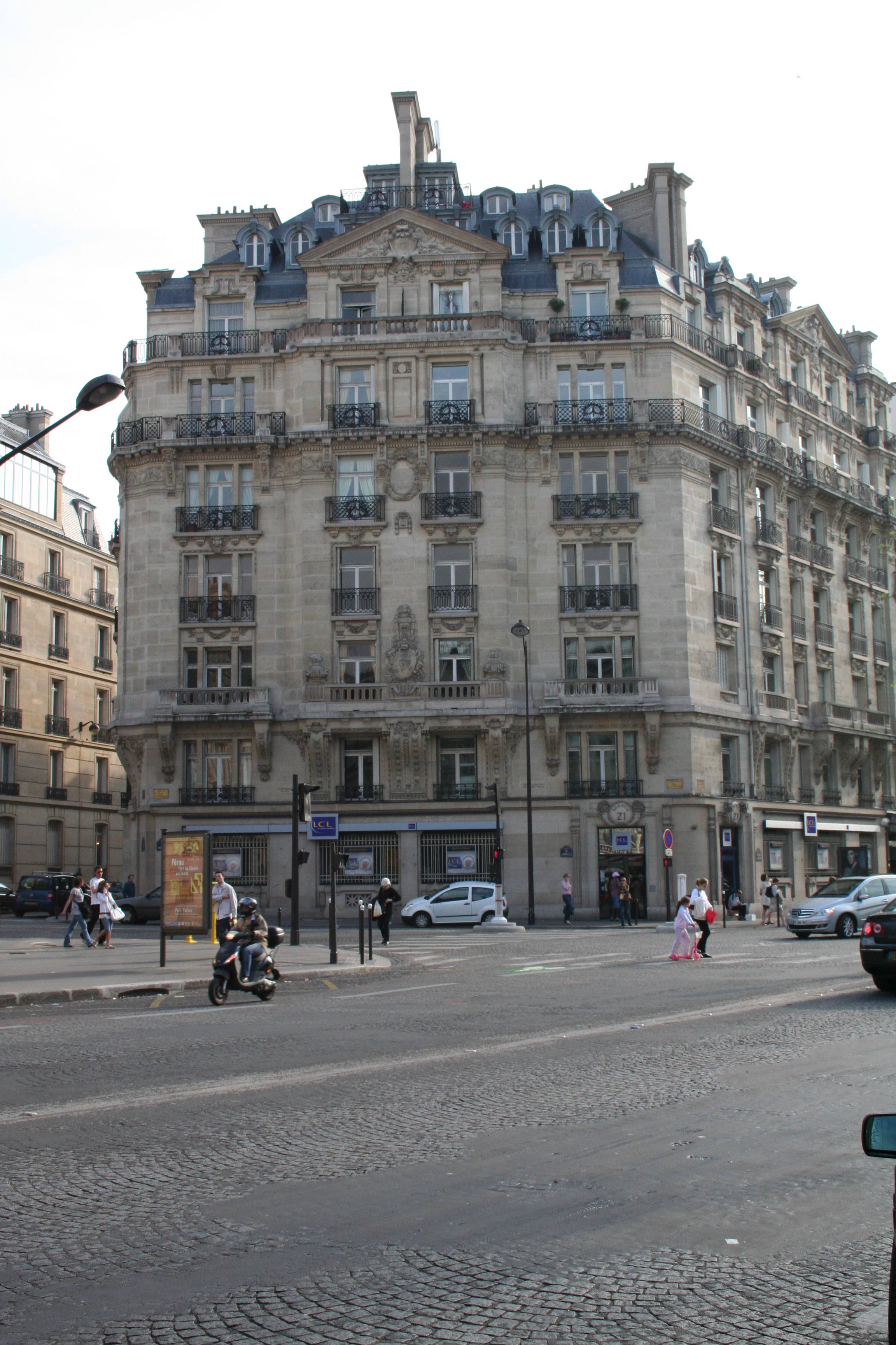 Boulevard Courcelles, Paris VIII.